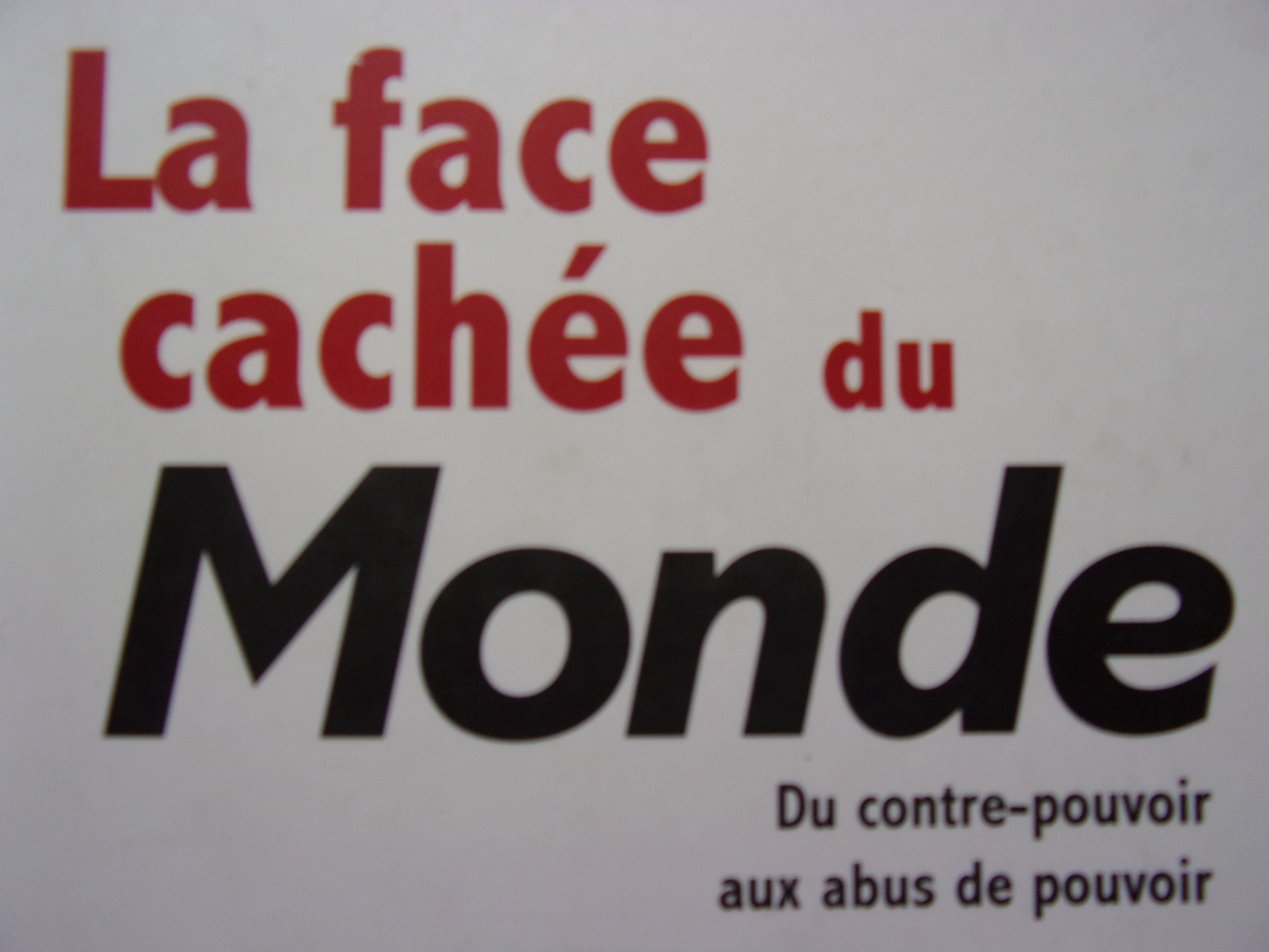 Indication du nom de l'auteur et du titre